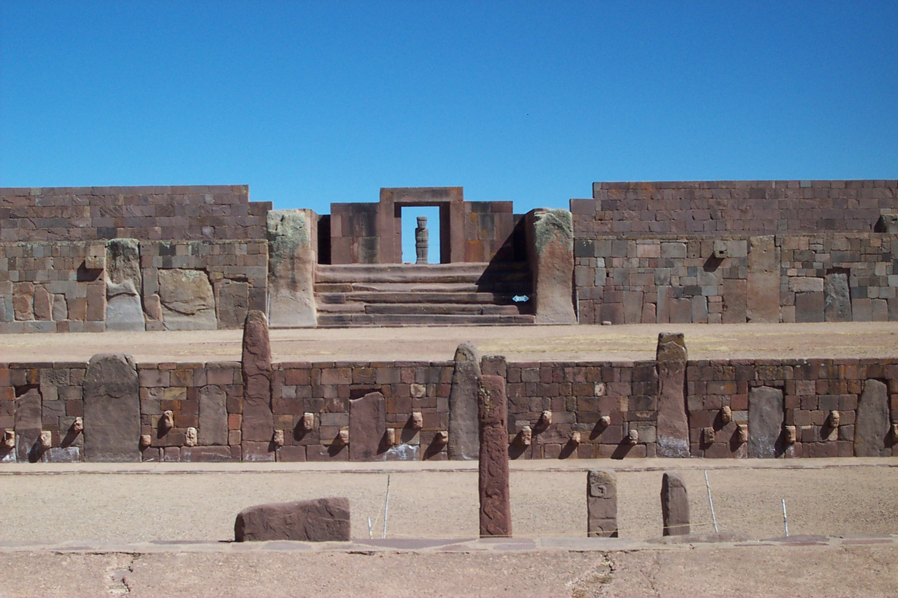 Eigen foto